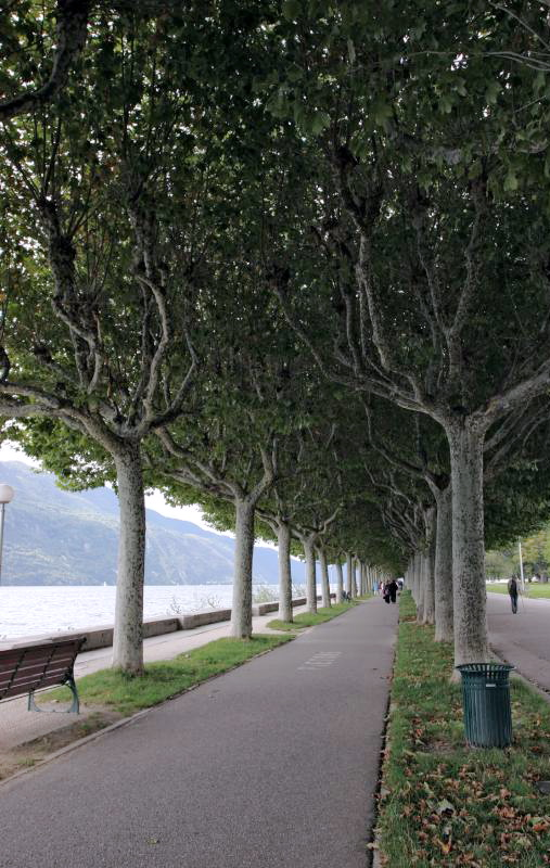 Esplanade sur les rives du Lac du Bourget dans la ville d'Aix-les-Bains en France dans le département de la Savoie.